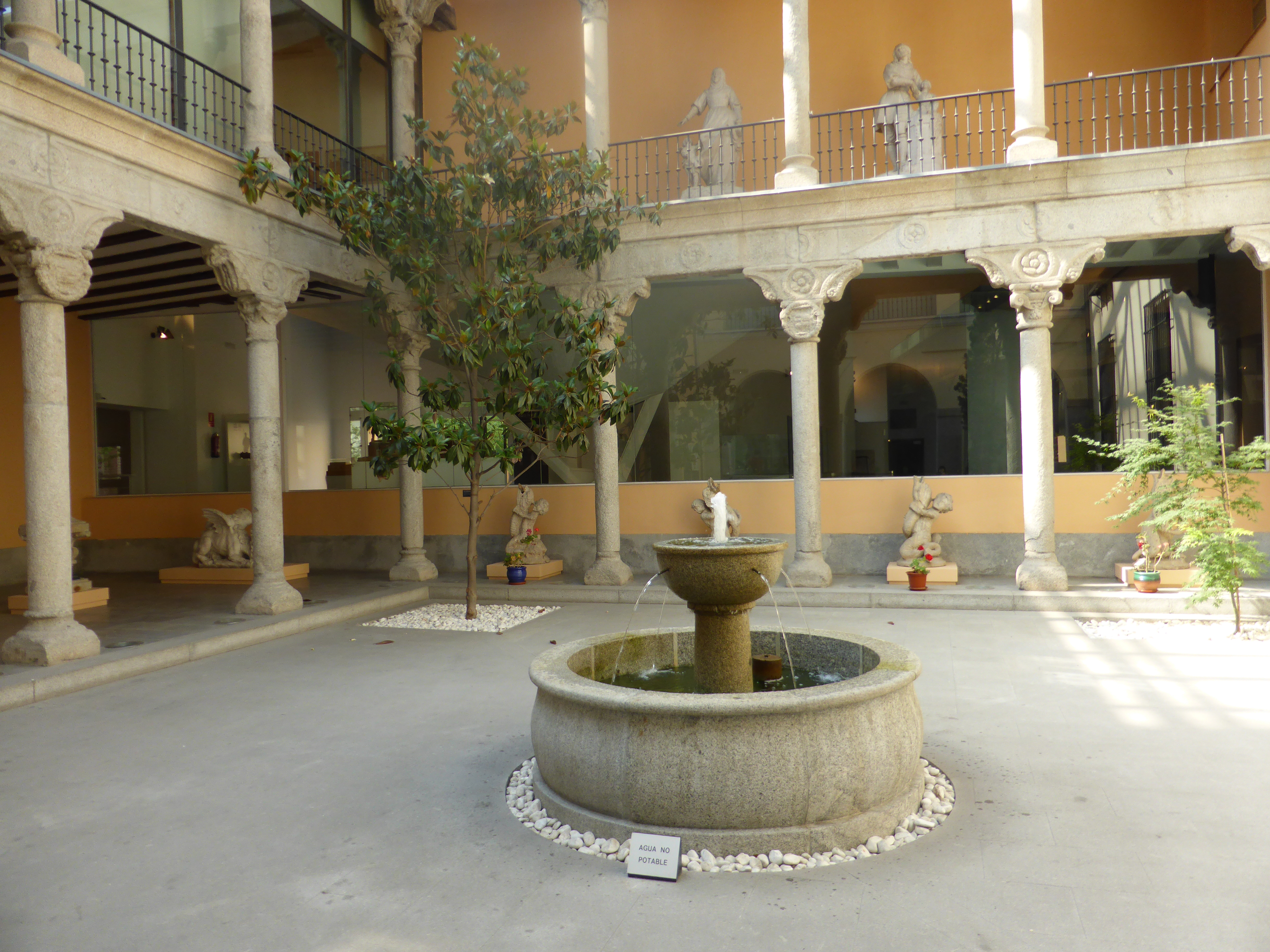 Patio renacentista del Museo de San Isidro, de Madrid. Se trataba de un palacio del siglo XVI, propiedad de la familia de los Lujanes. En 1986 fue adquirido por el Ayuntamiento de Madrid.